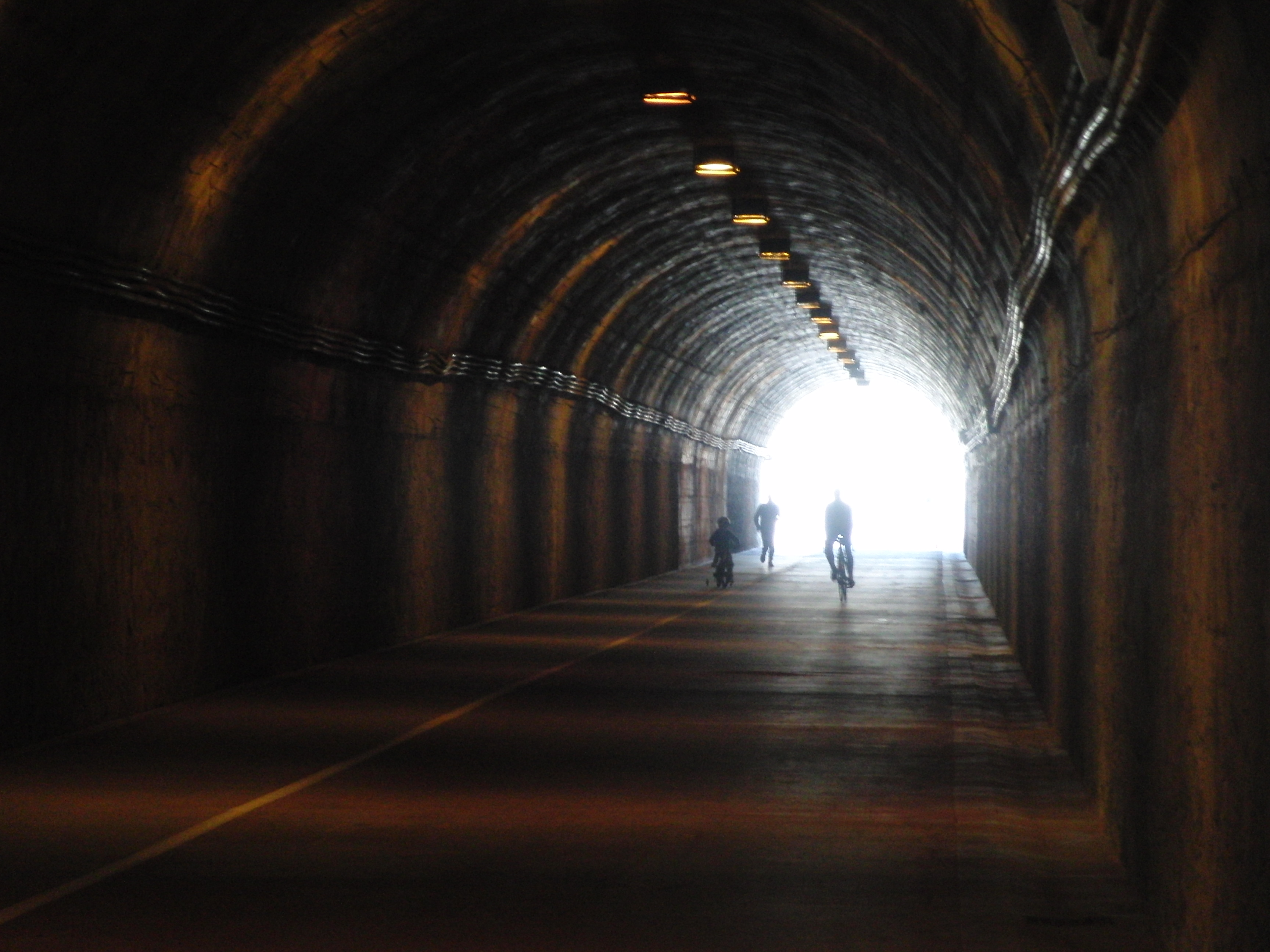 16 Tunel bajo vías del tren